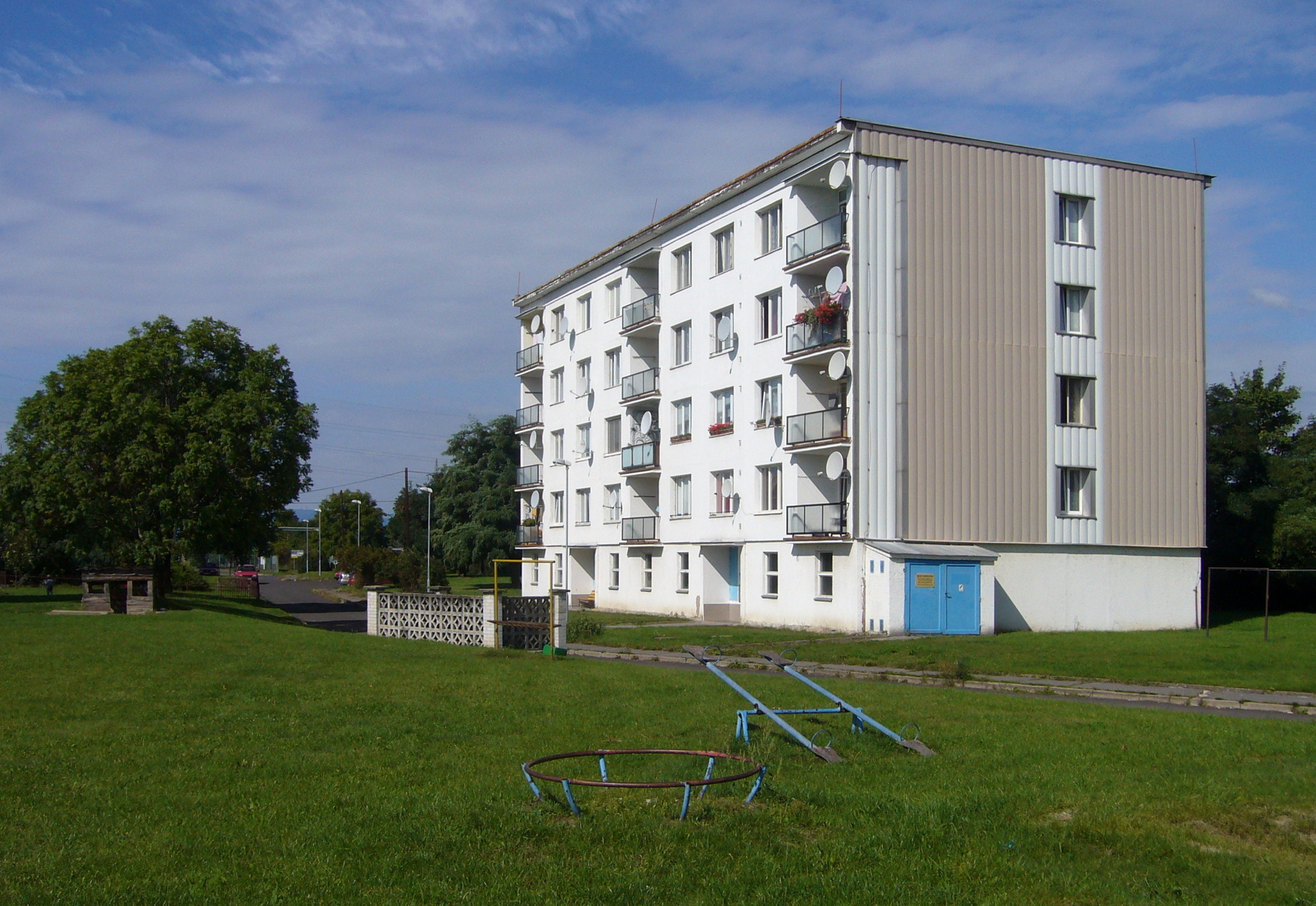 Jeden ze dvou panelových domů